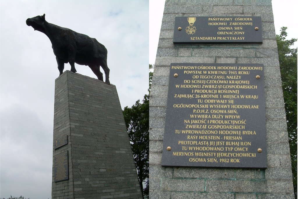 Socrealistyczny pomnik pod wsią Osowa Sień w województwie lubuskim w Polsce